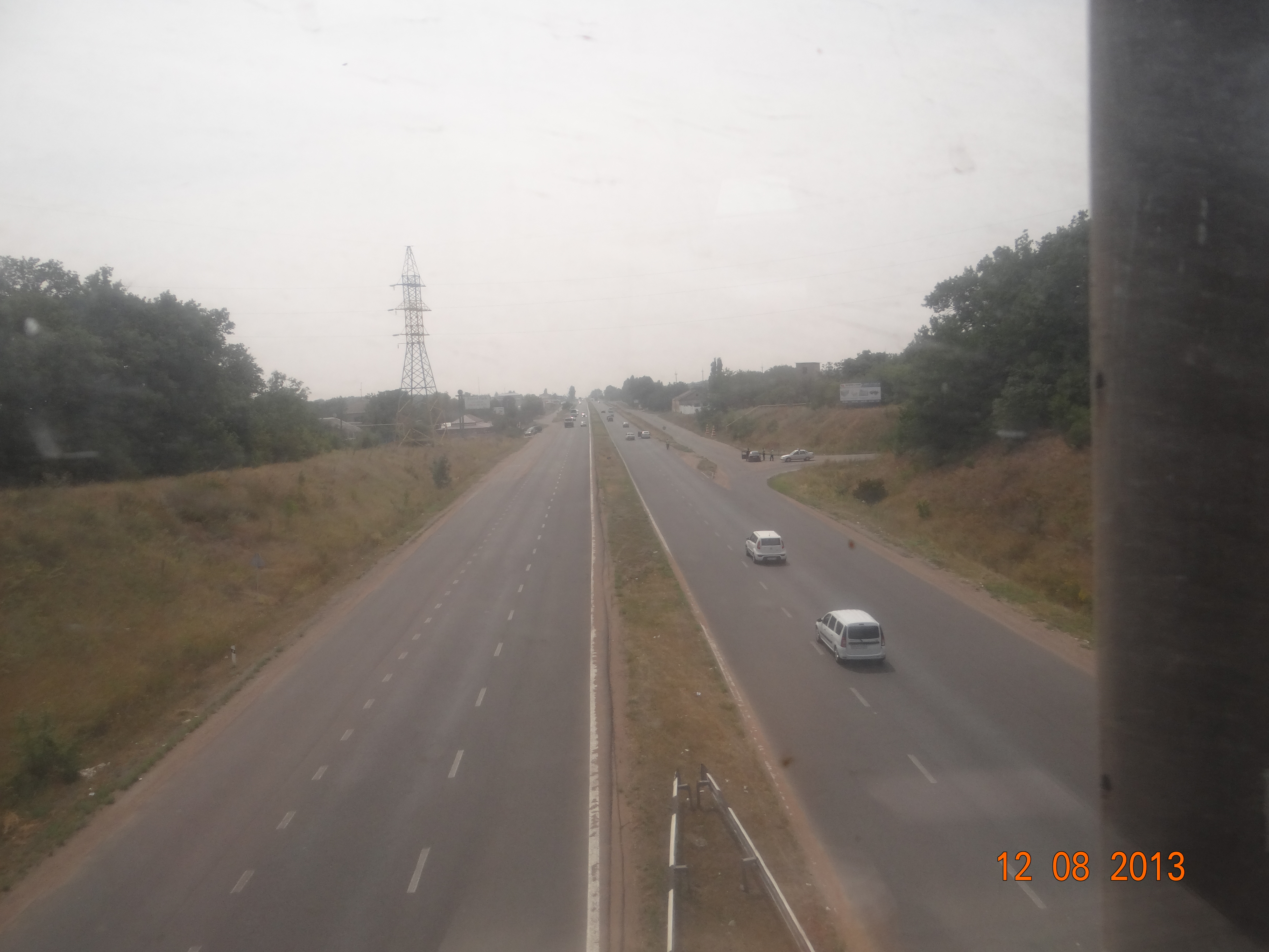 Автошлях Н 20 із залізничного мосту у Волновасі. Вигляд у напрямку Маріуполя